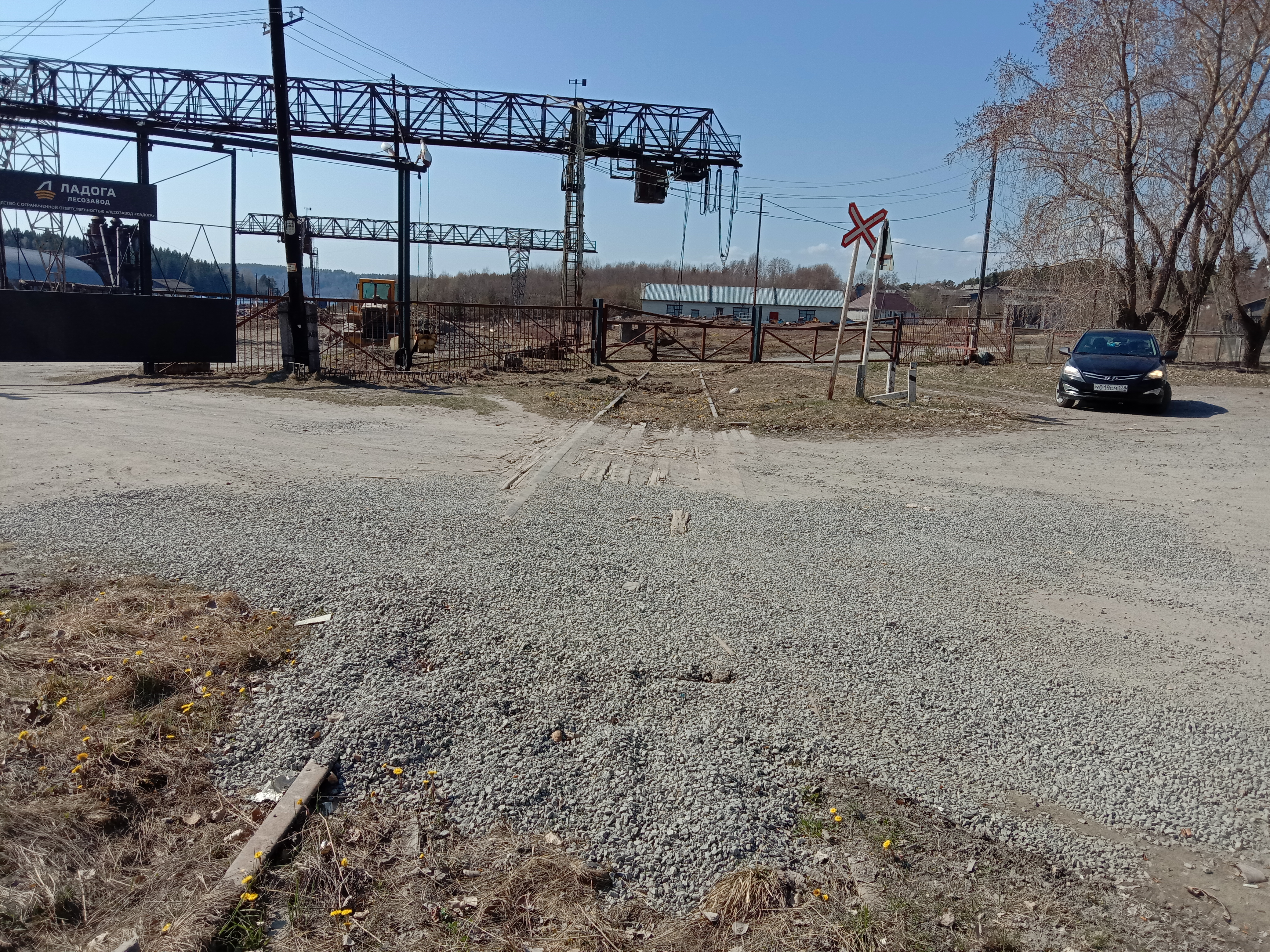 Ляскеля подъездной путь